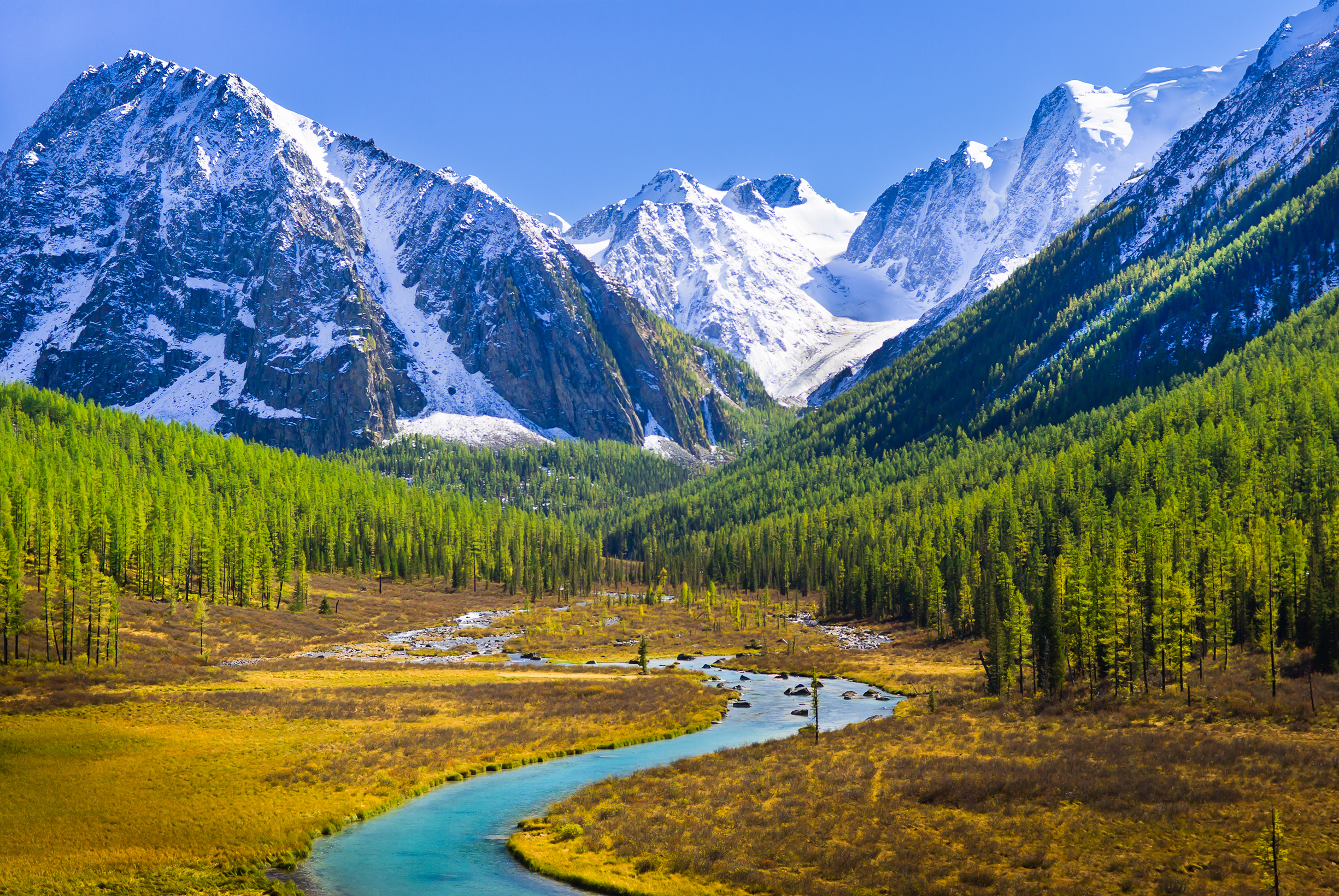 Шавлинский заказник: Кош-Агачский район, Алтай This image is related to the protected area of Russia number 0410008